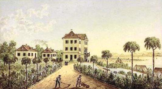 Gemälde der Eugensburg